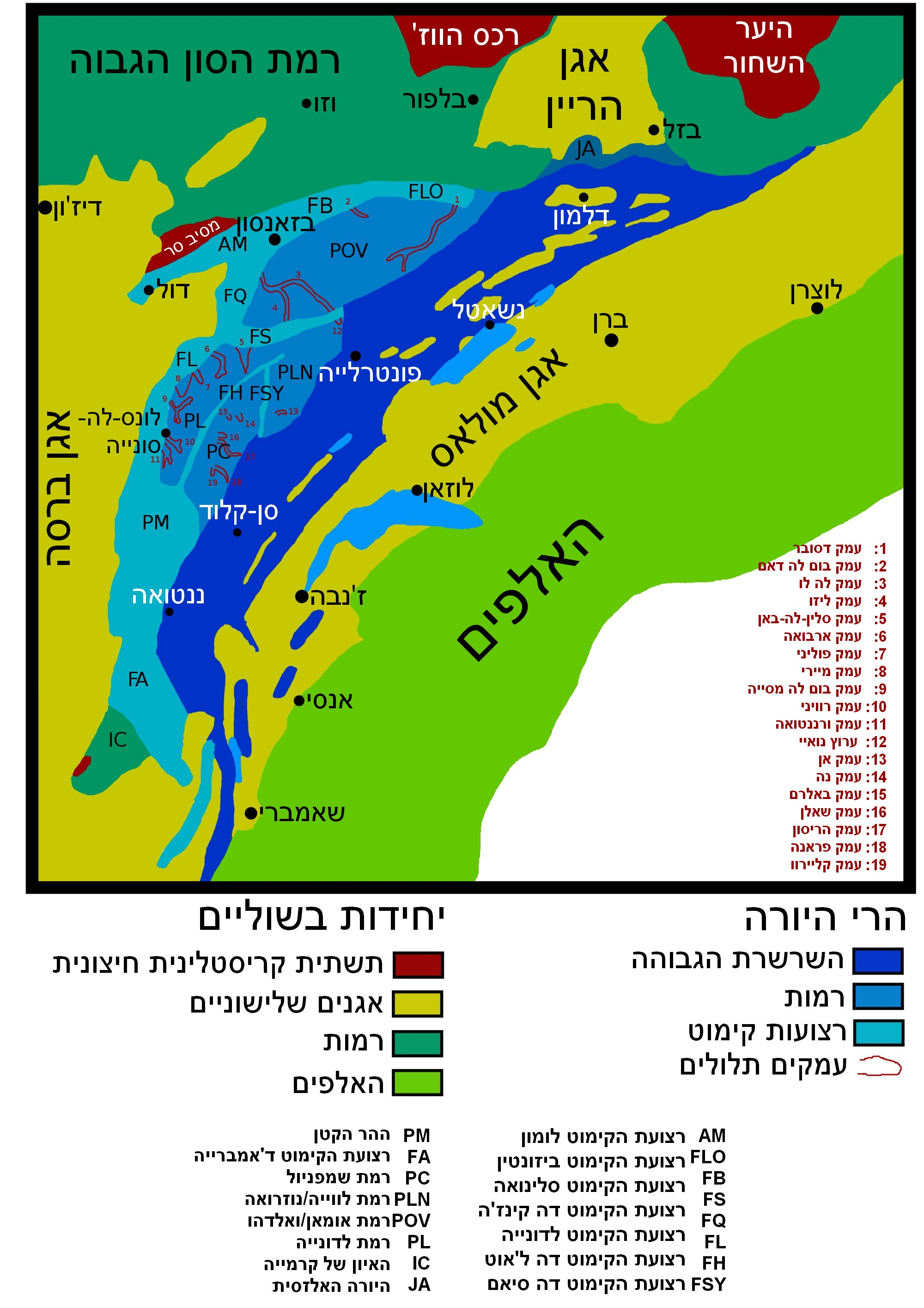 Structure géologique du Massif du Jura